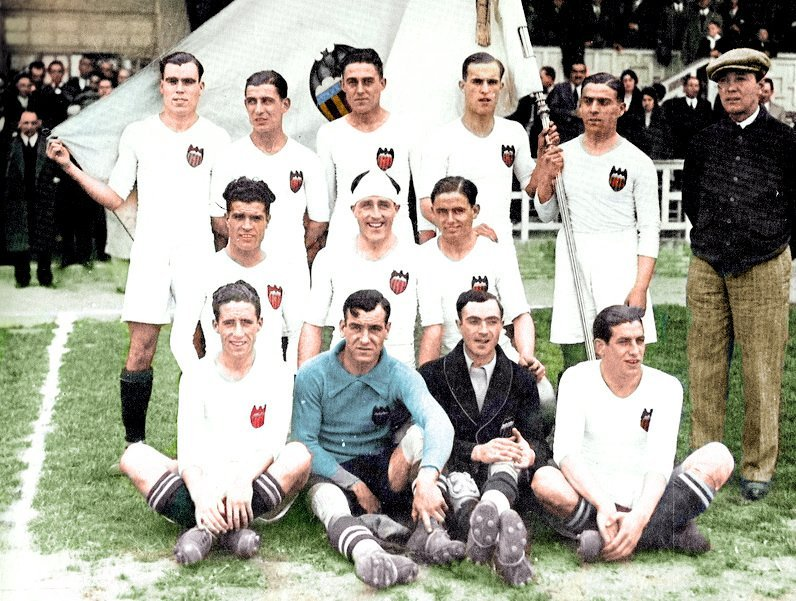 L'equip del València FC que va ascendir a primera el 31. De peu: Torredeflot, Picolín, Vilanova, Costa, Sánchez (capità) i l'entrenador Anton Fiverb. De genolls: Salvador, Molina i Conde. Assentats: Melenchón, Cano, Villarroya i Torregaray.